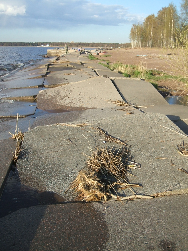 изменение берега под волновым воздействием